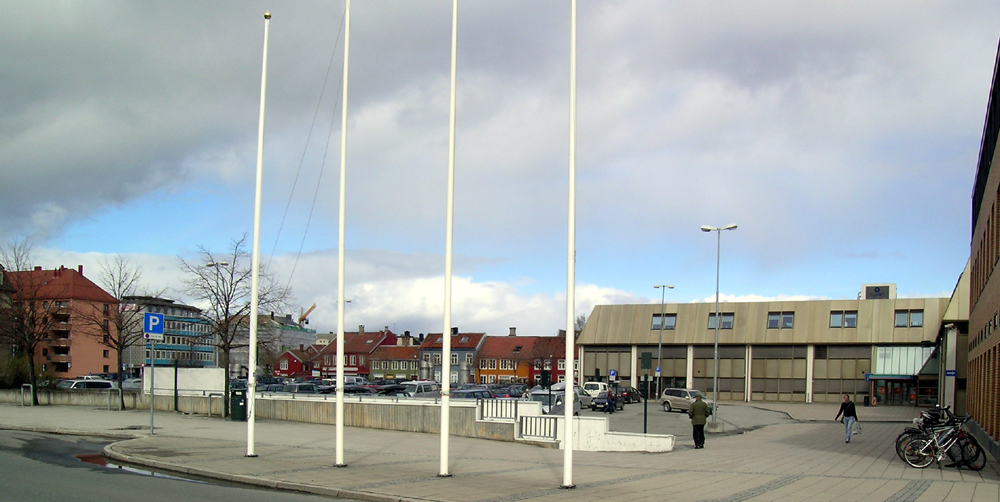 Leüthenhaven, Trondheim, Norway.